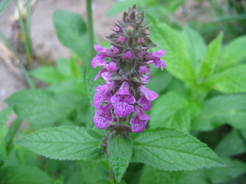 Zweifelhafter Ziest Stachys x ambigua